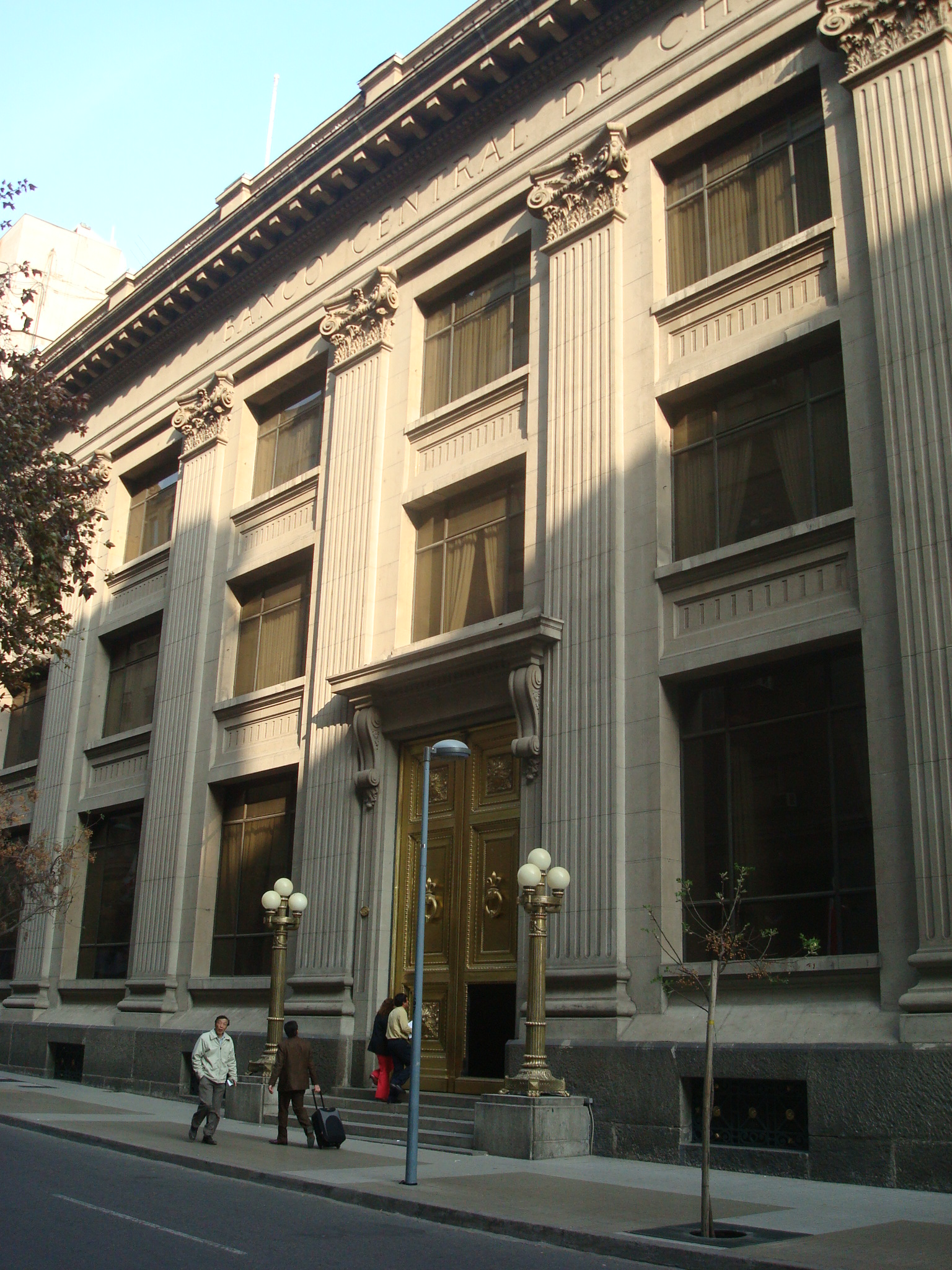 Banco Central de Chile, Santiago, Chile